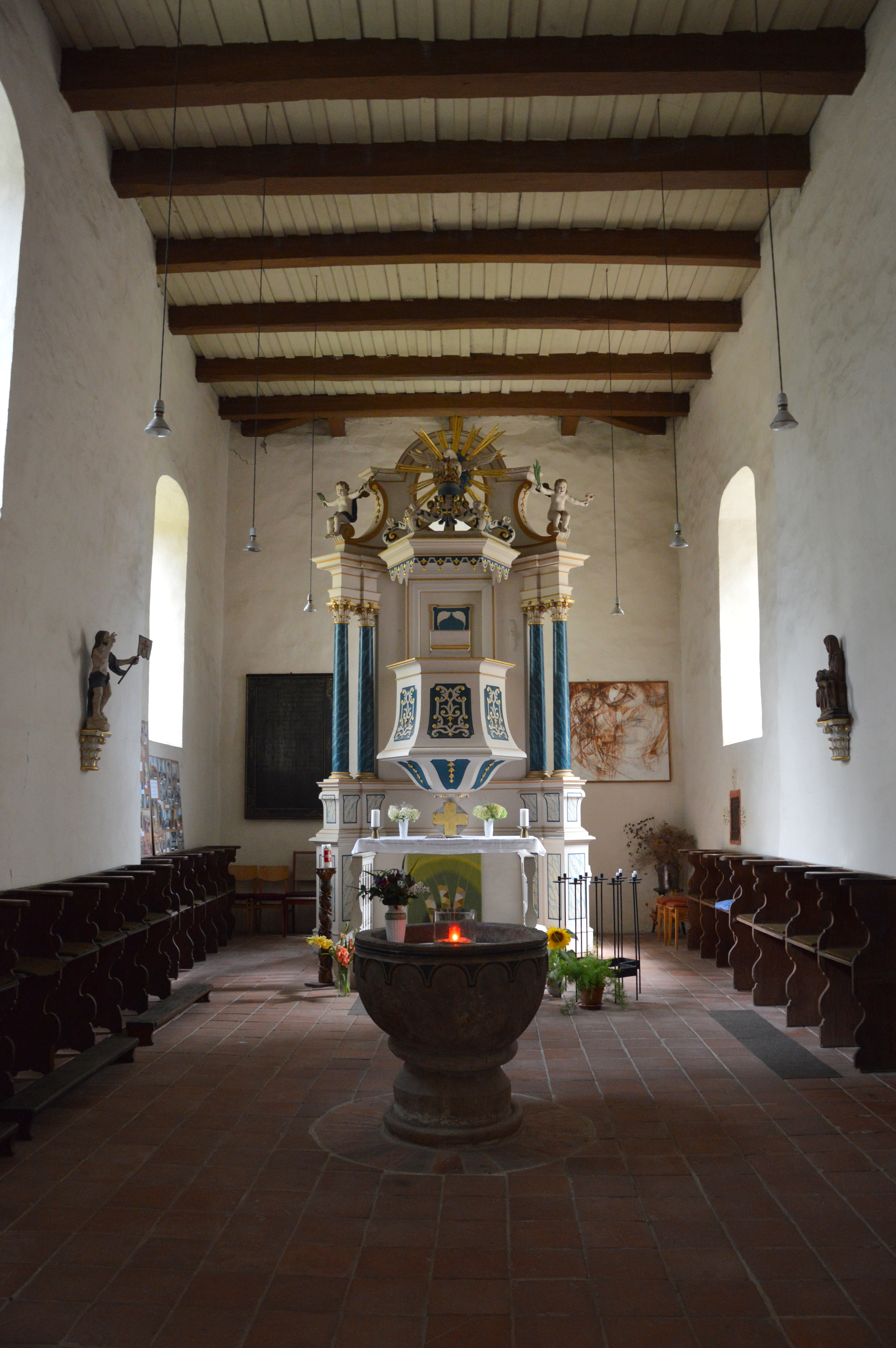 Kirche Plötzky Innen